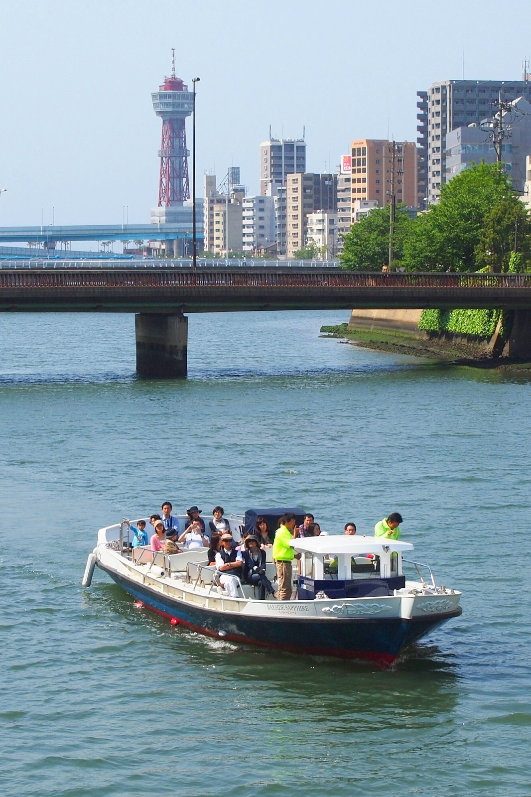 福岡市・那珂川を上る水上バス、福博みなとであい船「ベイサイド・サイファイア」